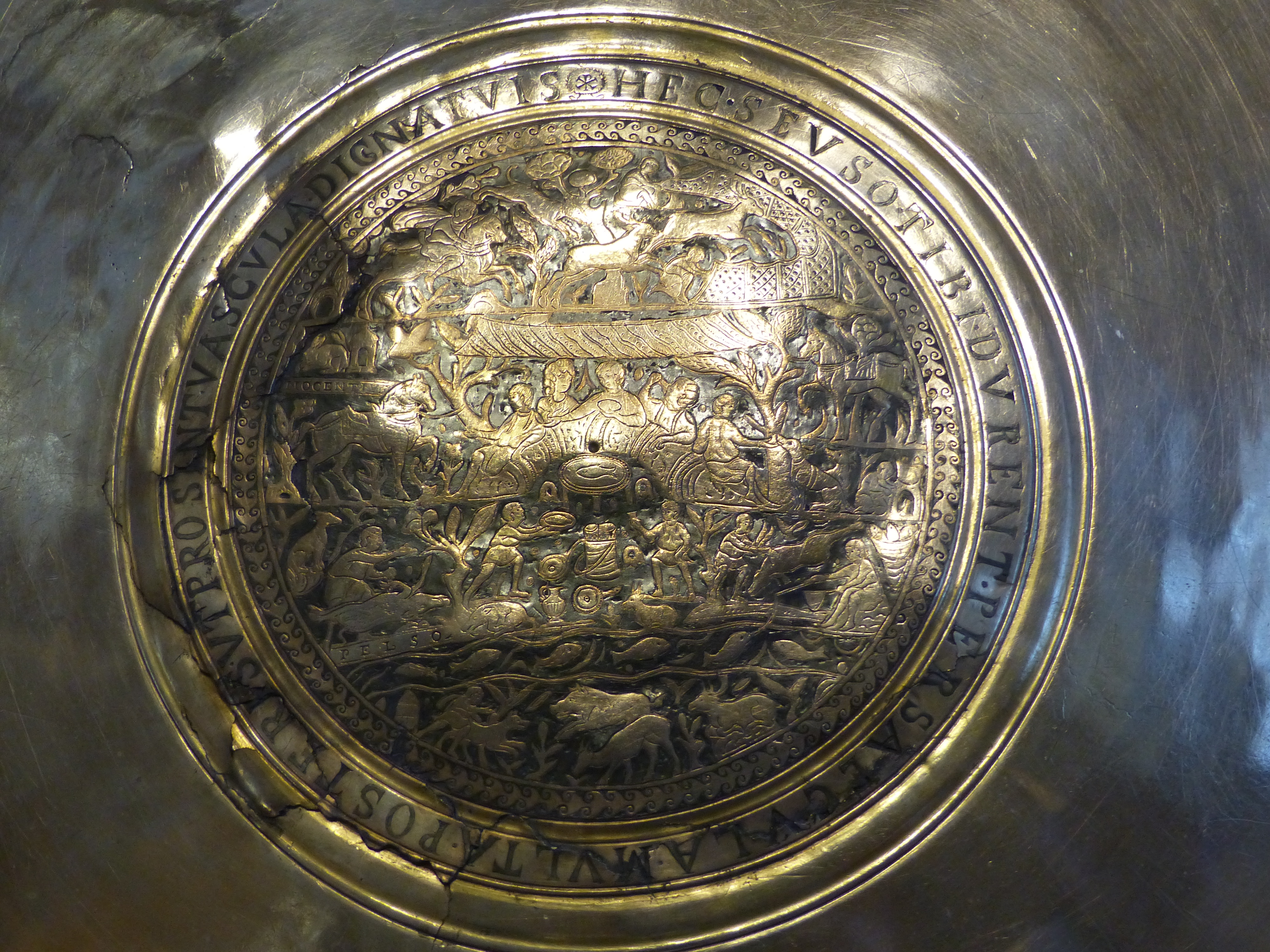 Vadásztál. Seuso kincs. A felvétel 2017. július 17-én, hétfőn készült az Országházban. Vadásztál. Lapos ezüsttál, átmérője 70,5 cm, tömege 8,8 kg. A tál közepén vadászati jelenetekkel közrefogott szabadtéri lakomajelenet. Kör alakú mezőbe foglalt díszítését latin nyelvű verses felirat keretezi. Seuso a kincs tulajdonosa lehetett aki jelentős családi esemény, talán mennyegző alkalmával kaphatta ajándékba ezt a tárgyat. A vadásztársaság egy halban gazdag Balaton partján lakomázik. A víz felett Pelso (Balaton). A tál a 4. század közepe táján készülhetett. Seuso, Pannonia helytartója birtokának széle a legközelebbi Balatonpart a Partfő, Balatonkenesén.